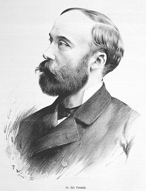 Prof. JUDr. Jiří Pražák, Czech lawyer